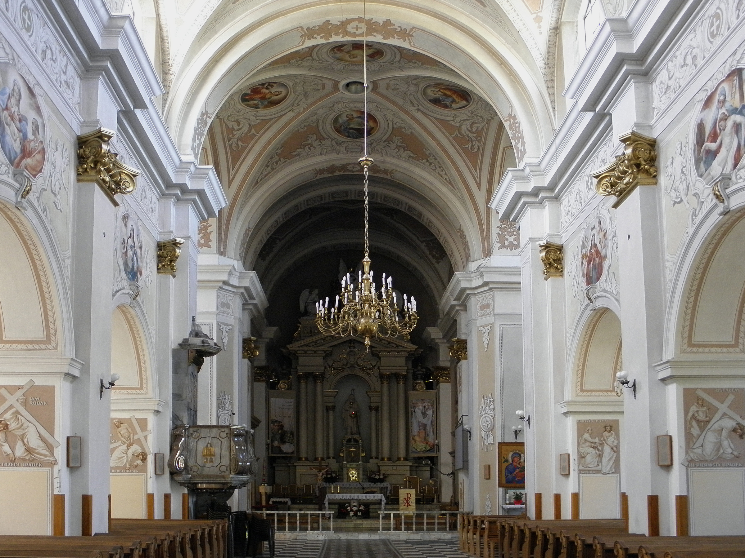 Pionki - nawa główna kościoła św.Barbary